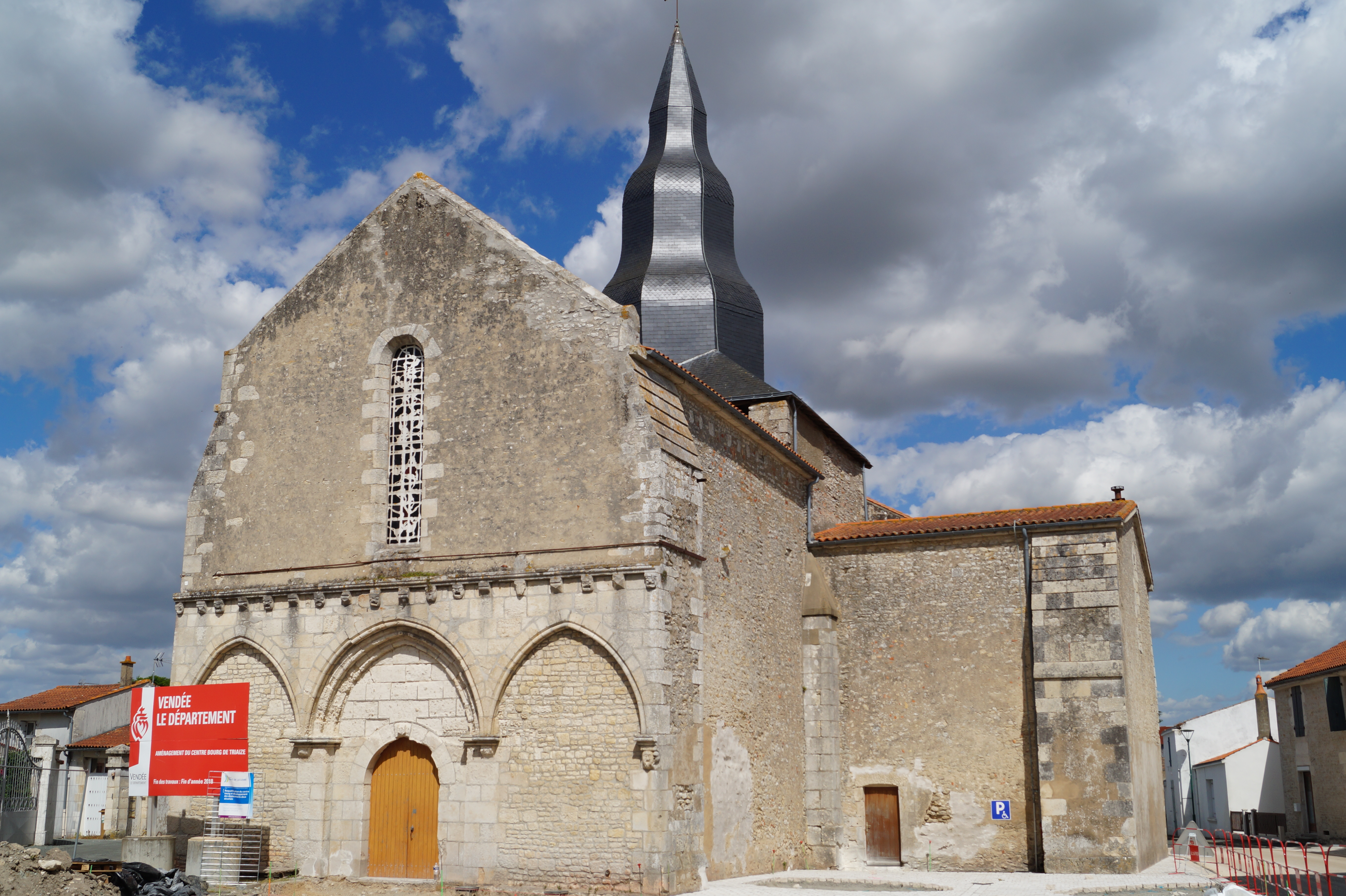 L’église Saint-Jean-l’Évangéliste de Triaize depuis la place Georges-Clemenceau.